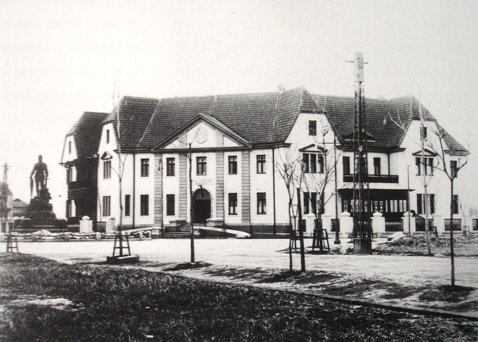 天津德国领事馆